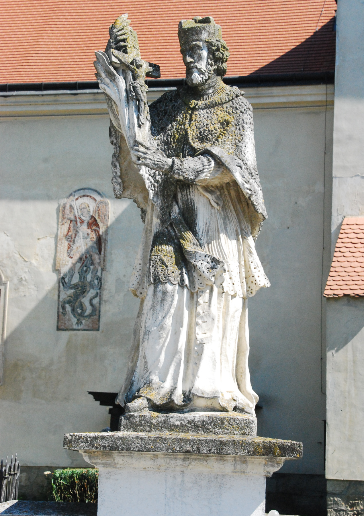 Statue des heiligen Johannes Nepomuk vor der Kirche von Reinprechtspölla in Niederösterreich